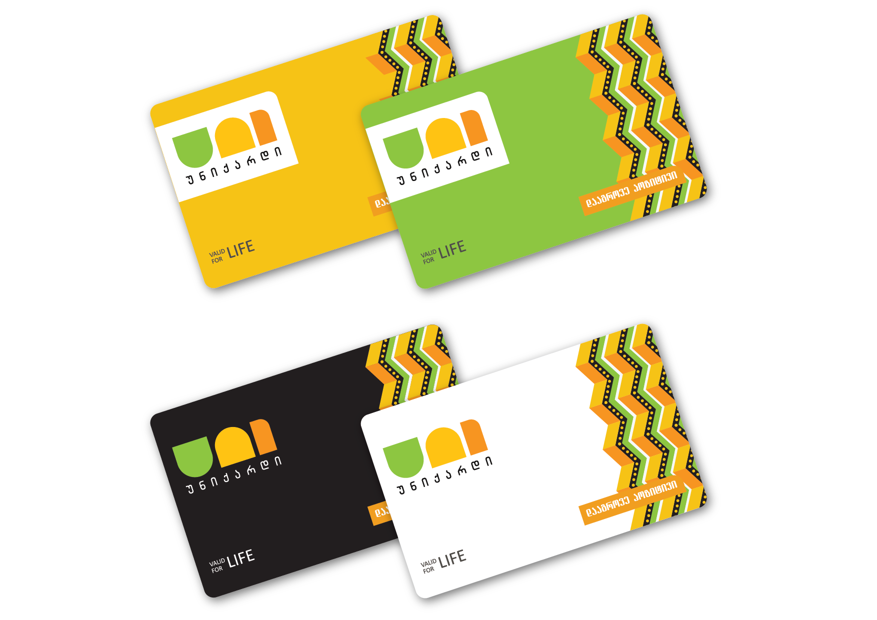 უნიქარდის ბარათები